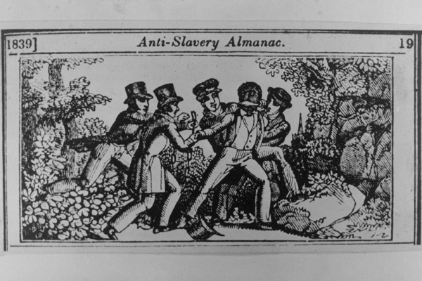 A imagem, uma caricatura de "caçadores de escravos", apareceu na Anti-Slavery Almanac (Almanaque Anti-Escravidão) de 1839, portanto, possíveis direitos autoriais da imagem já expiraram.